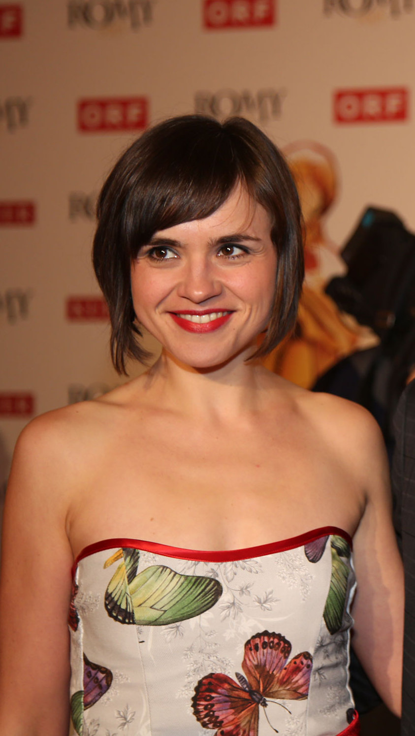 Mari Lang (links), Christoph Feurstein